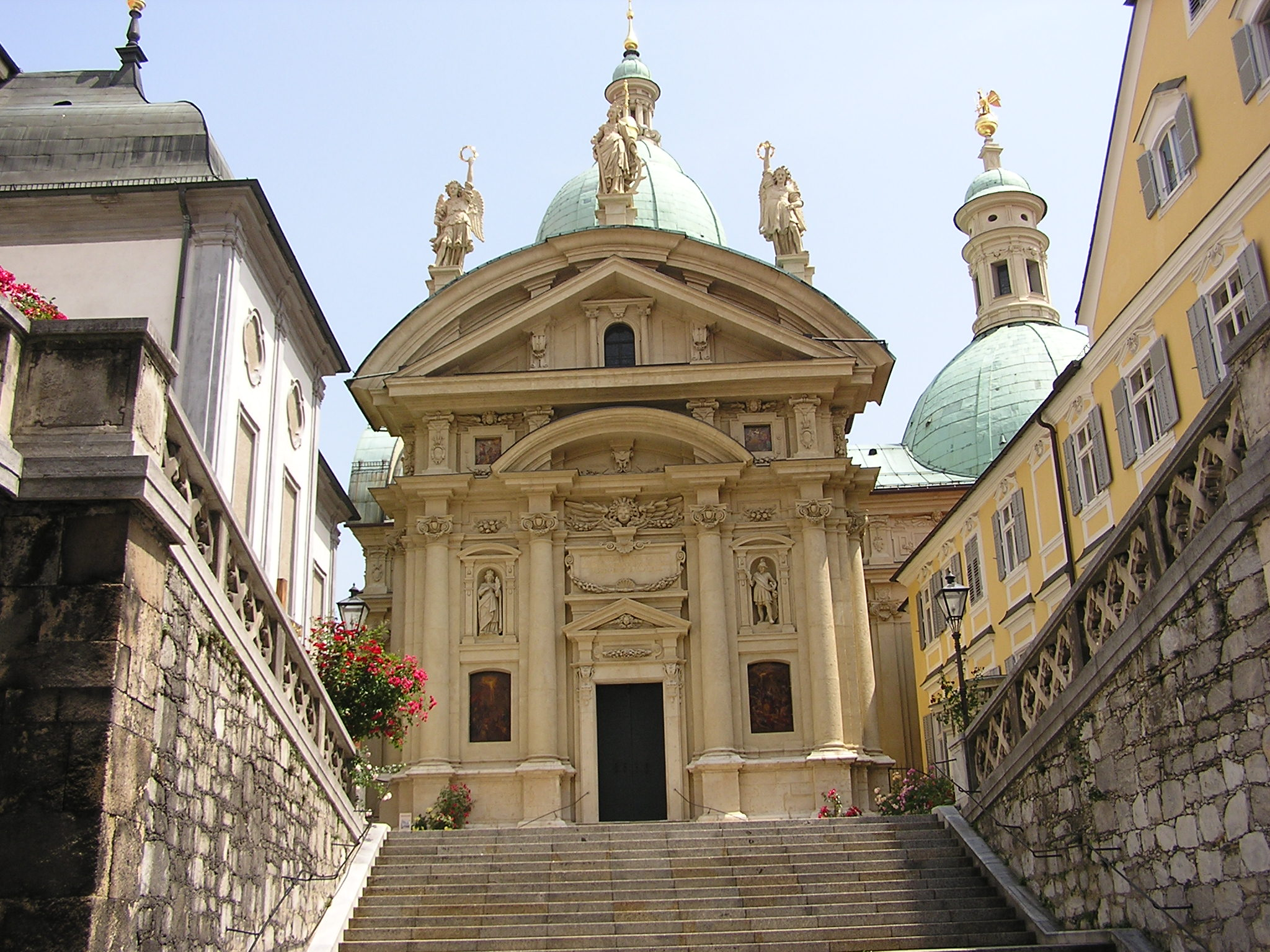 Katharinenkirche und Mausoleum (Graz)